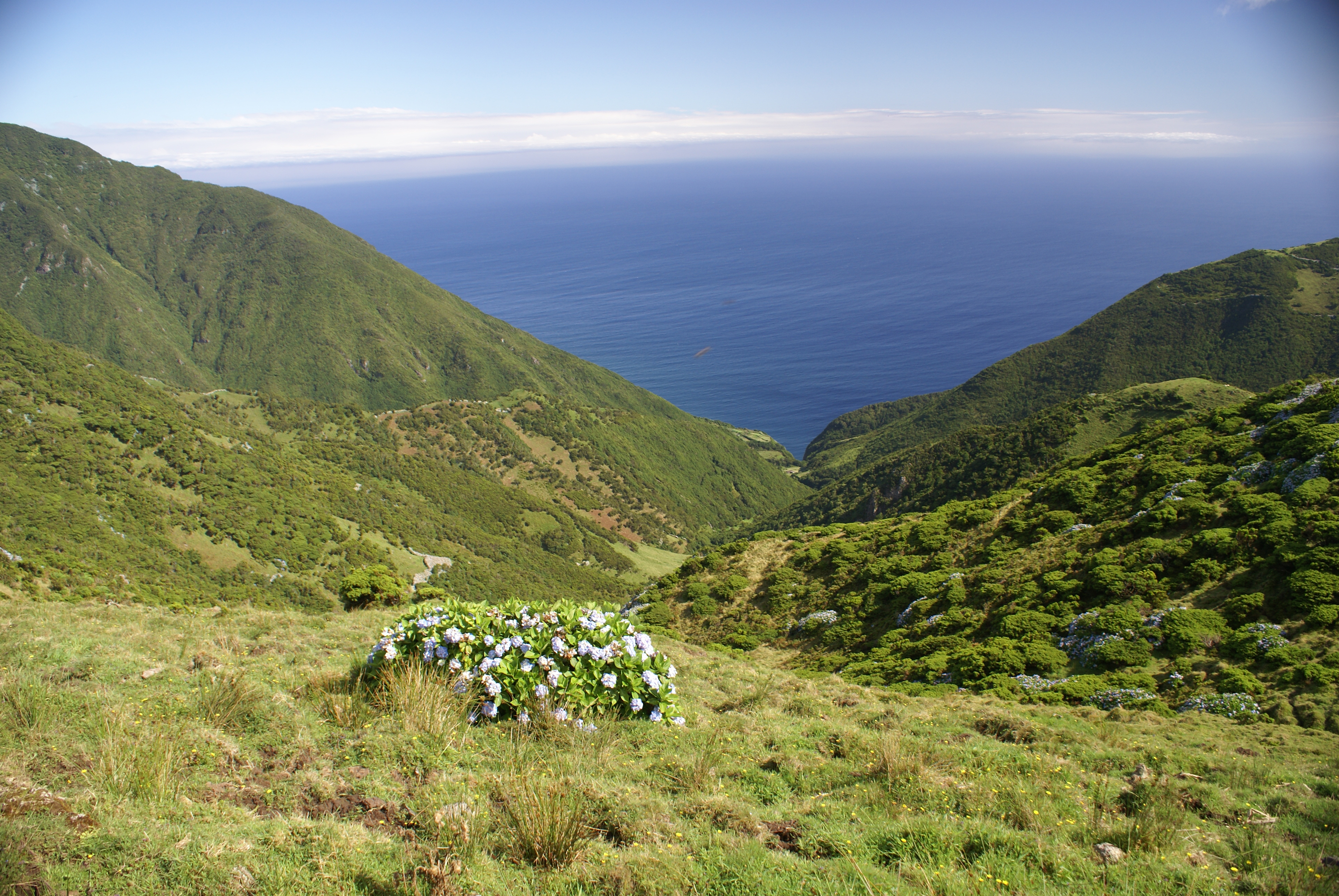 Caminho pedestre das Serras do Topo para a Fajã de Santo Cristo, Calheta, ilha de São Jorge, Açores